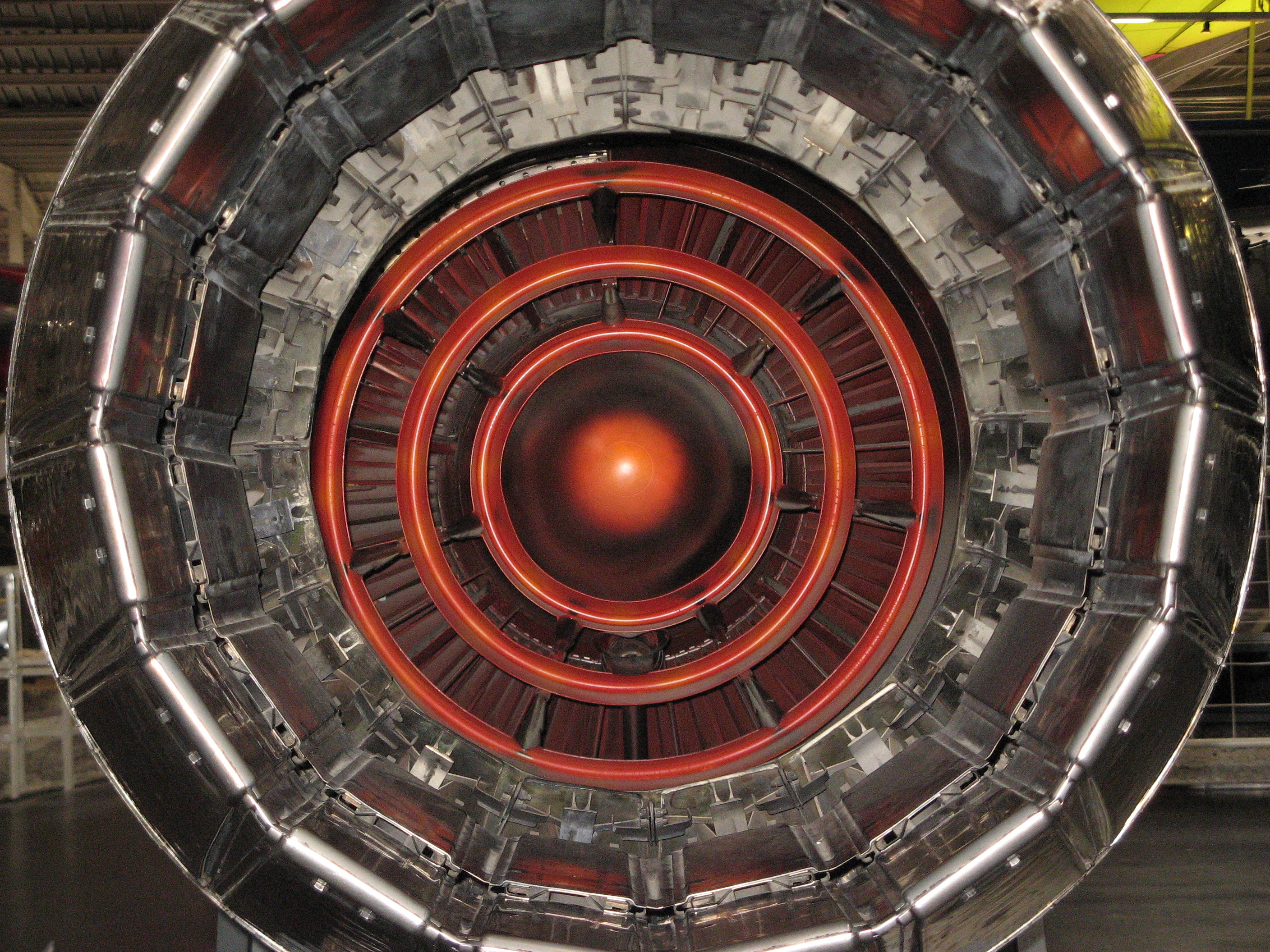 Engine Lockheed F104, Exhibition: Technik-Museum Sinsheim, Germany